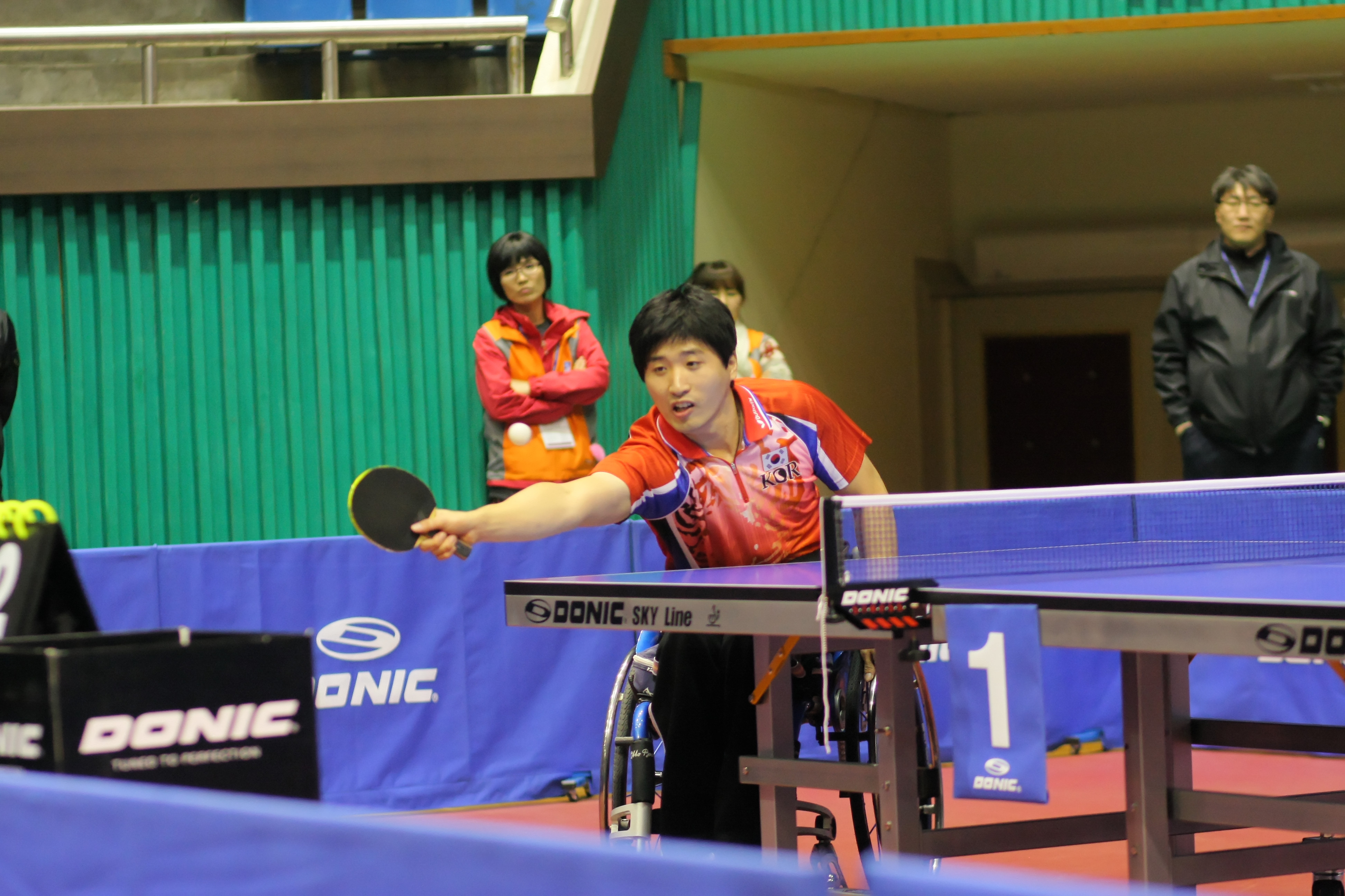 KIM Young-gun (KOR)